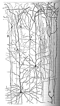 Ճակատային գլխակեղևի վերին շերտերը